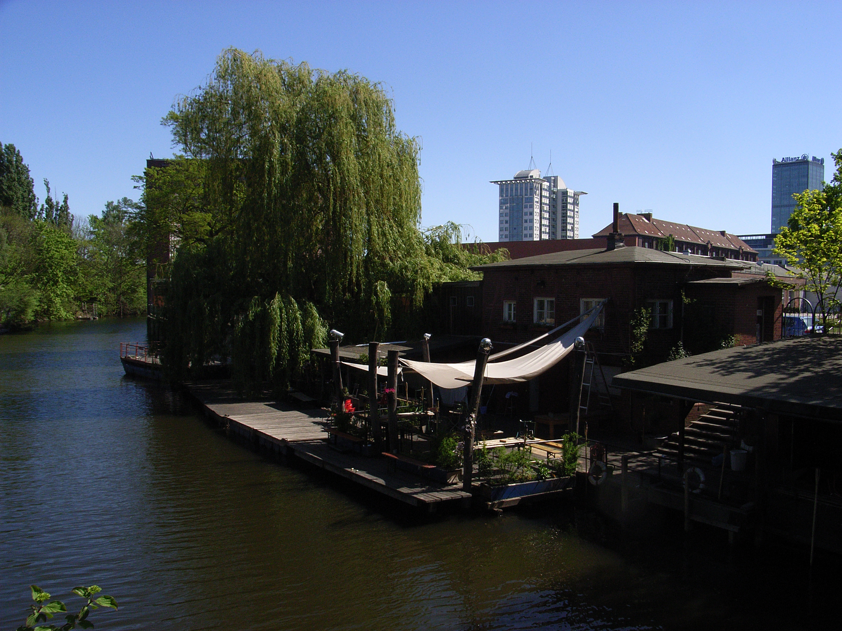 Flutgraben mit dem Club der Visionäre in Berlin.